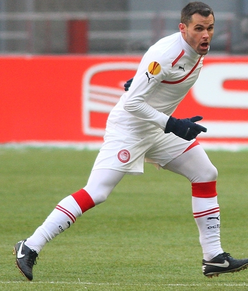 Пабло Орбаис игрок ФК Олимпиакос